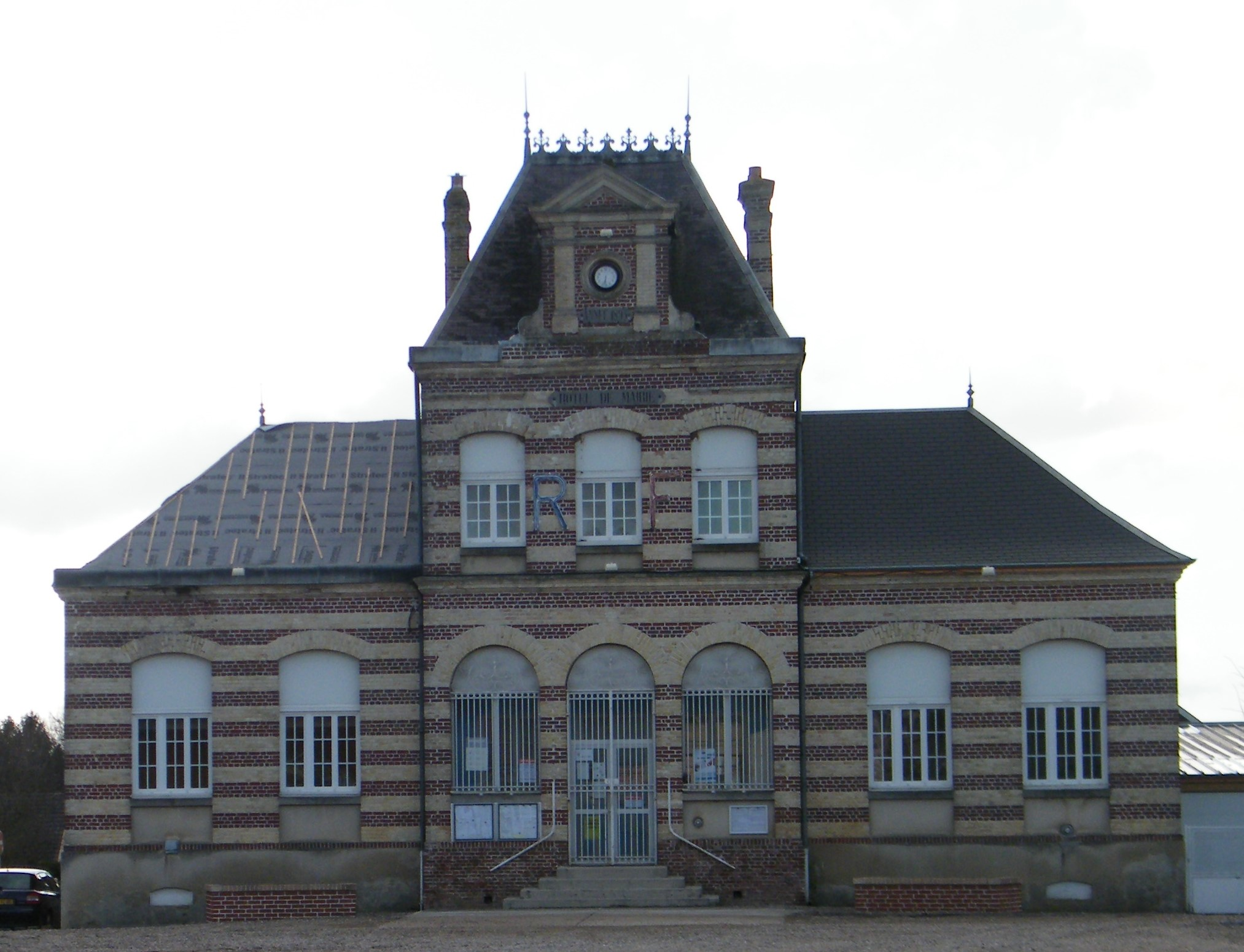 La mairie.